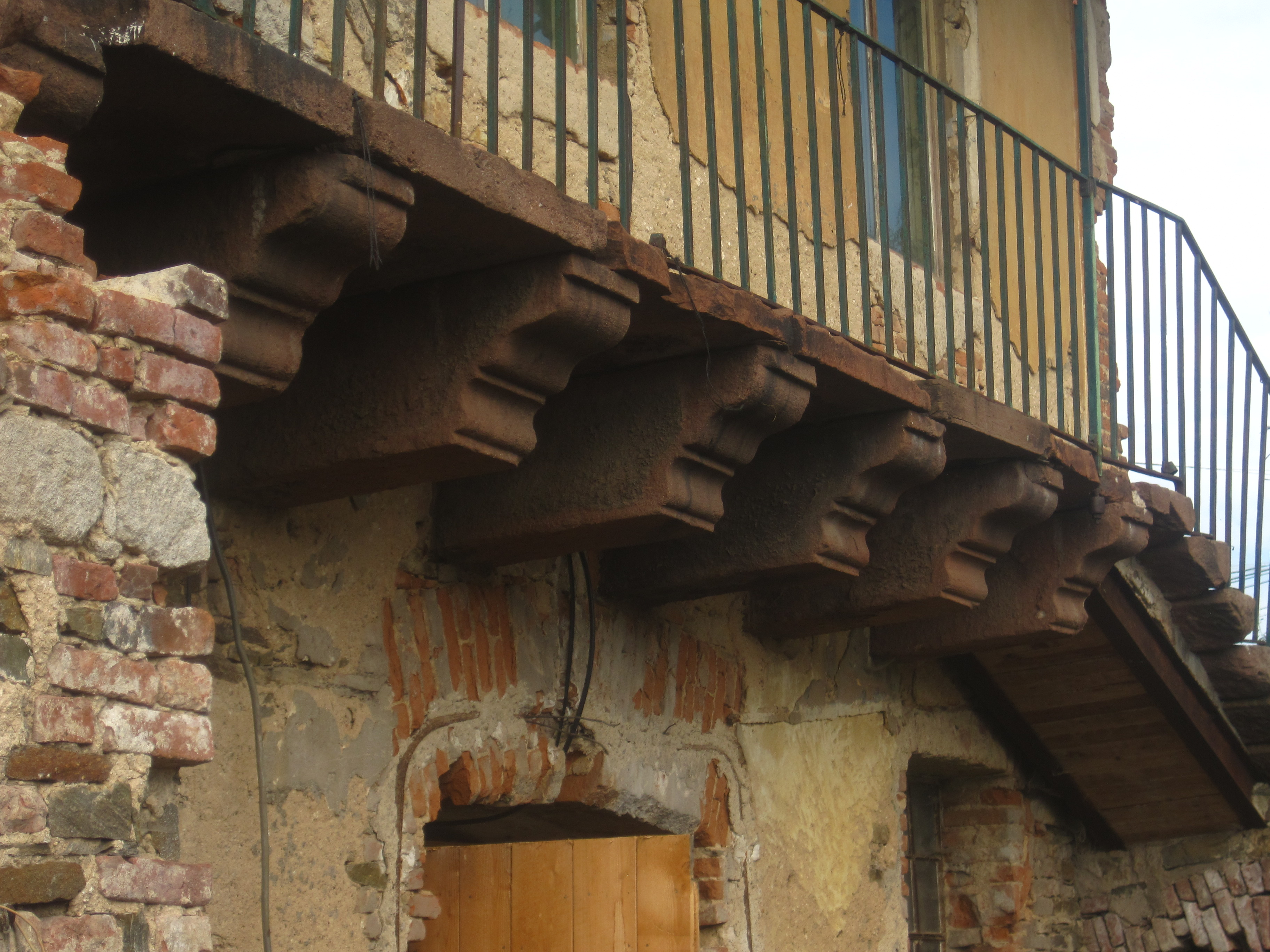 Tvrz Hradenín, Hradenín 13, Hradenín.